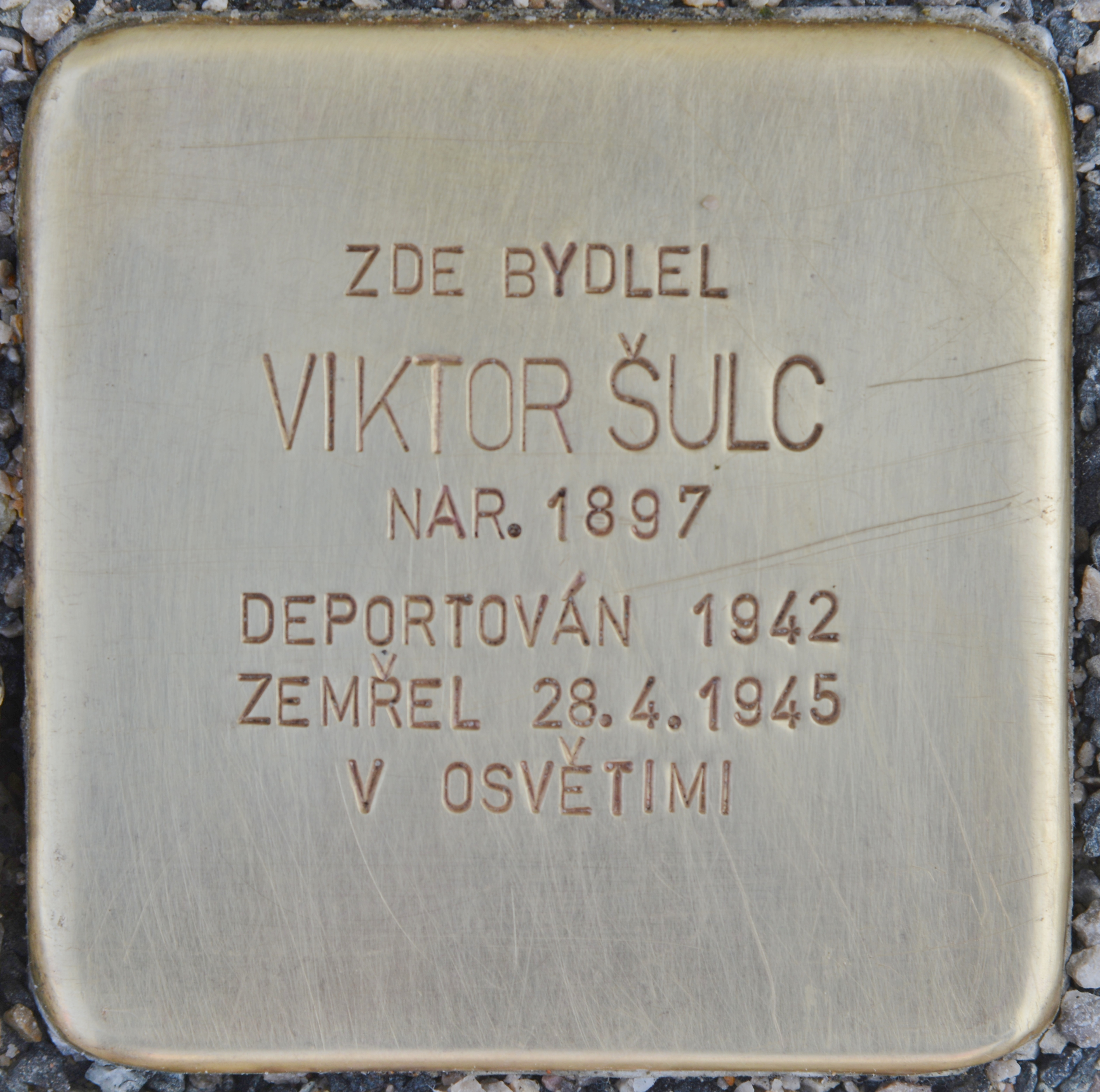 Stolperstein für Viktor Sulc